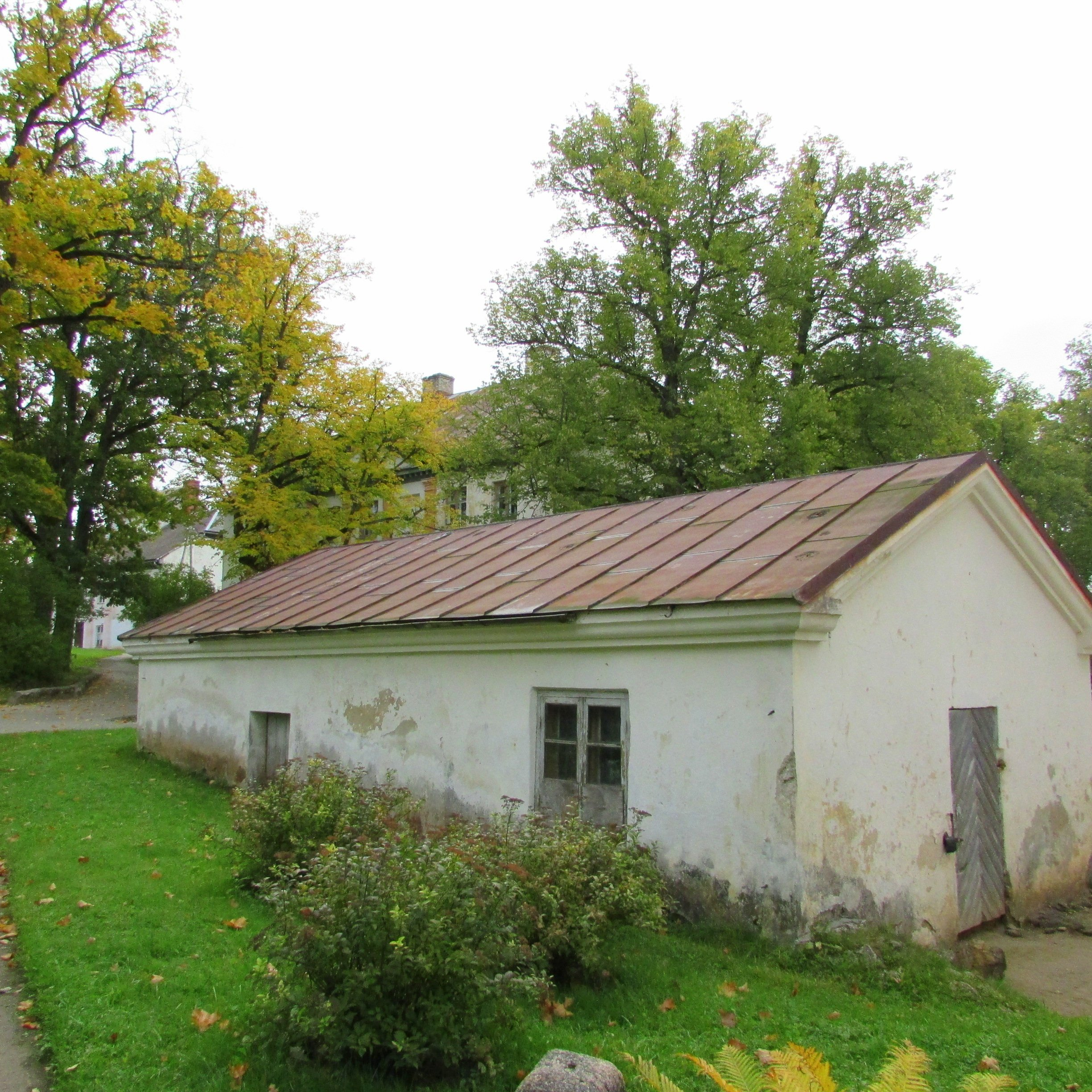 Leduspagrabs, Gaujienas pagasts